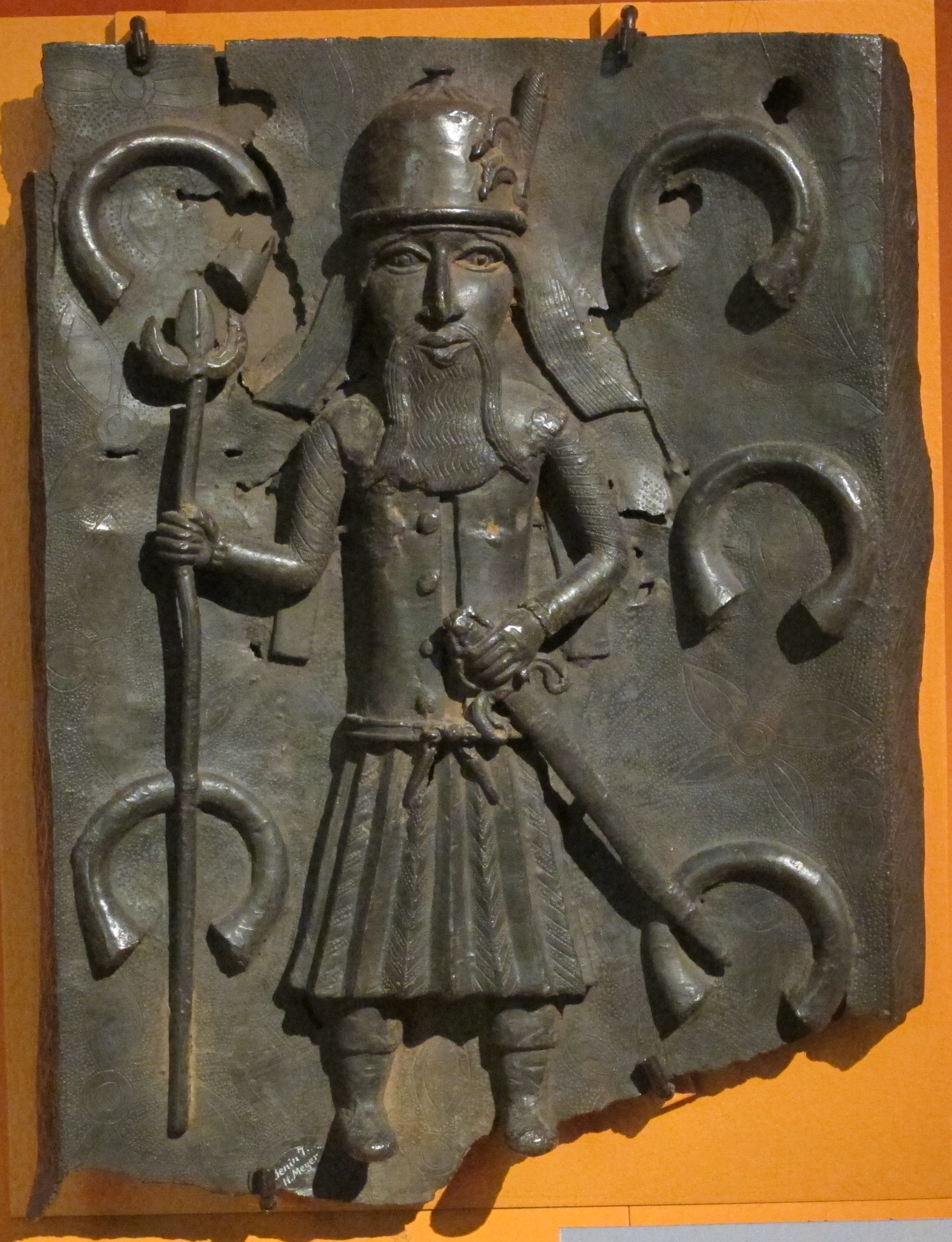 Benin, portoghese, XVI-XVII sec